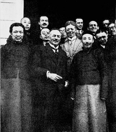 中文（台灣）: 斯文·赫定與樊耀南，右前為樊耀南。